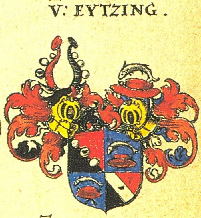 Wappen der Freiherrn von Eytzing nach Siebmacher